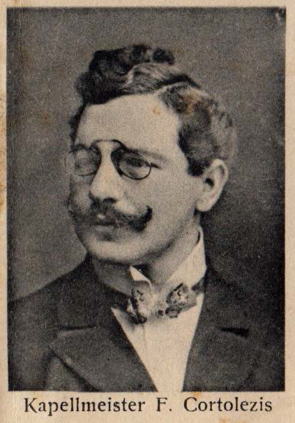 "Kapellmeister F. Cortolezis" Fritz Cortolezis, Dirigent Eines von 44 Porträts von Ensemblemitgliedern des Stadttheaters Regensburg aus dem ausziehbaren Leporello einer Ansichtskarte "Stadttheater Regensburg", gelaufen 1906.